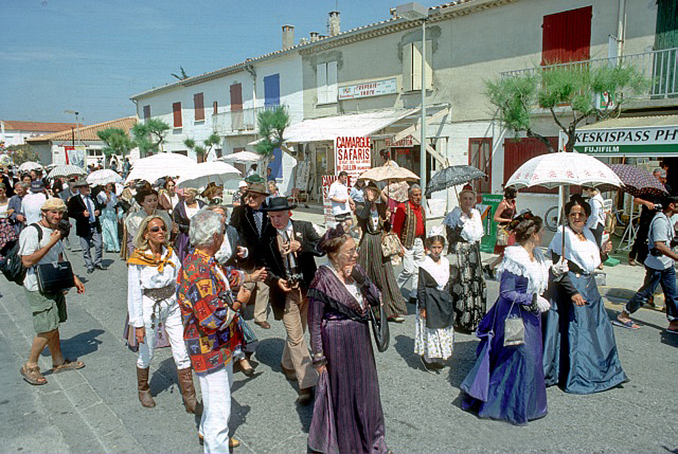 Arlésiennes en costume lors du pèlerinage gitan aux Saintes-Maries-de-la-Mer